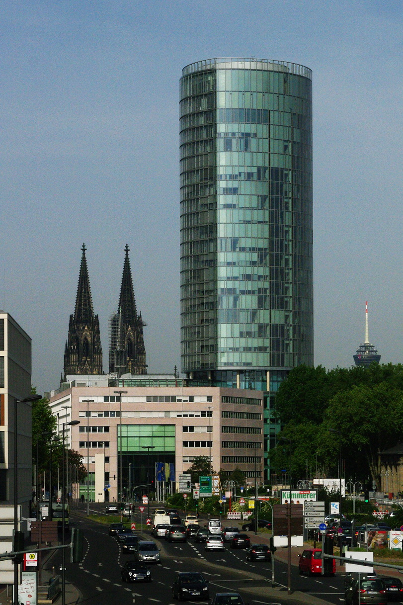 Hochhaus KölnTriangle vom Stadthaus gesehen